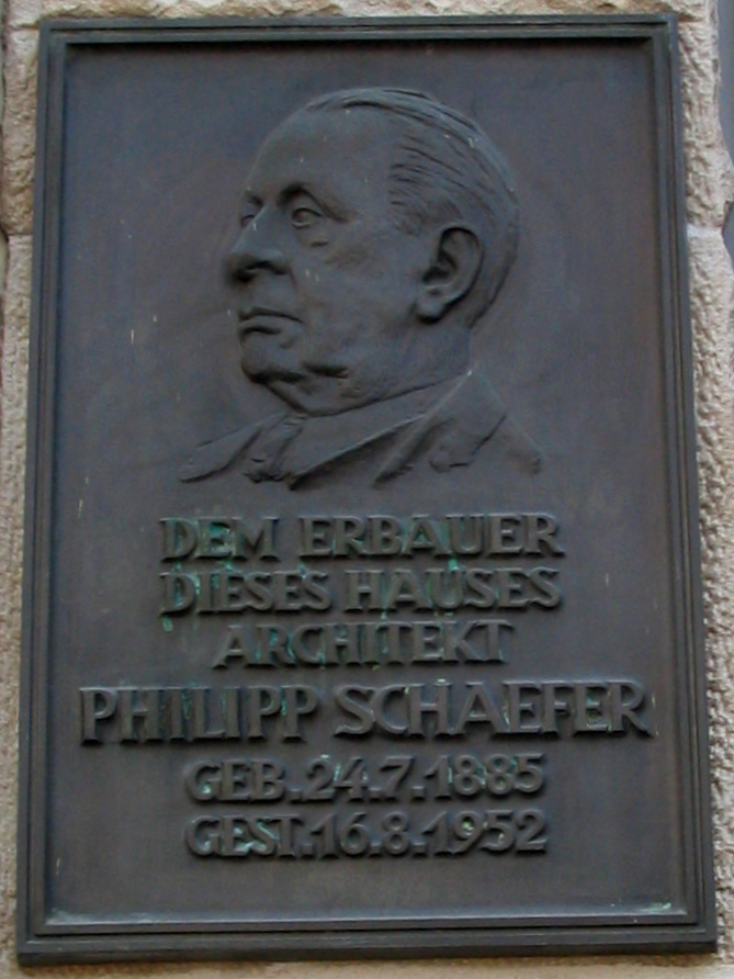 Karstadt, Düsseldorf, 2011